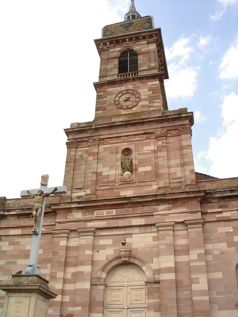 Eglise Notre Dame de la Visitation Raddon et Chapendu